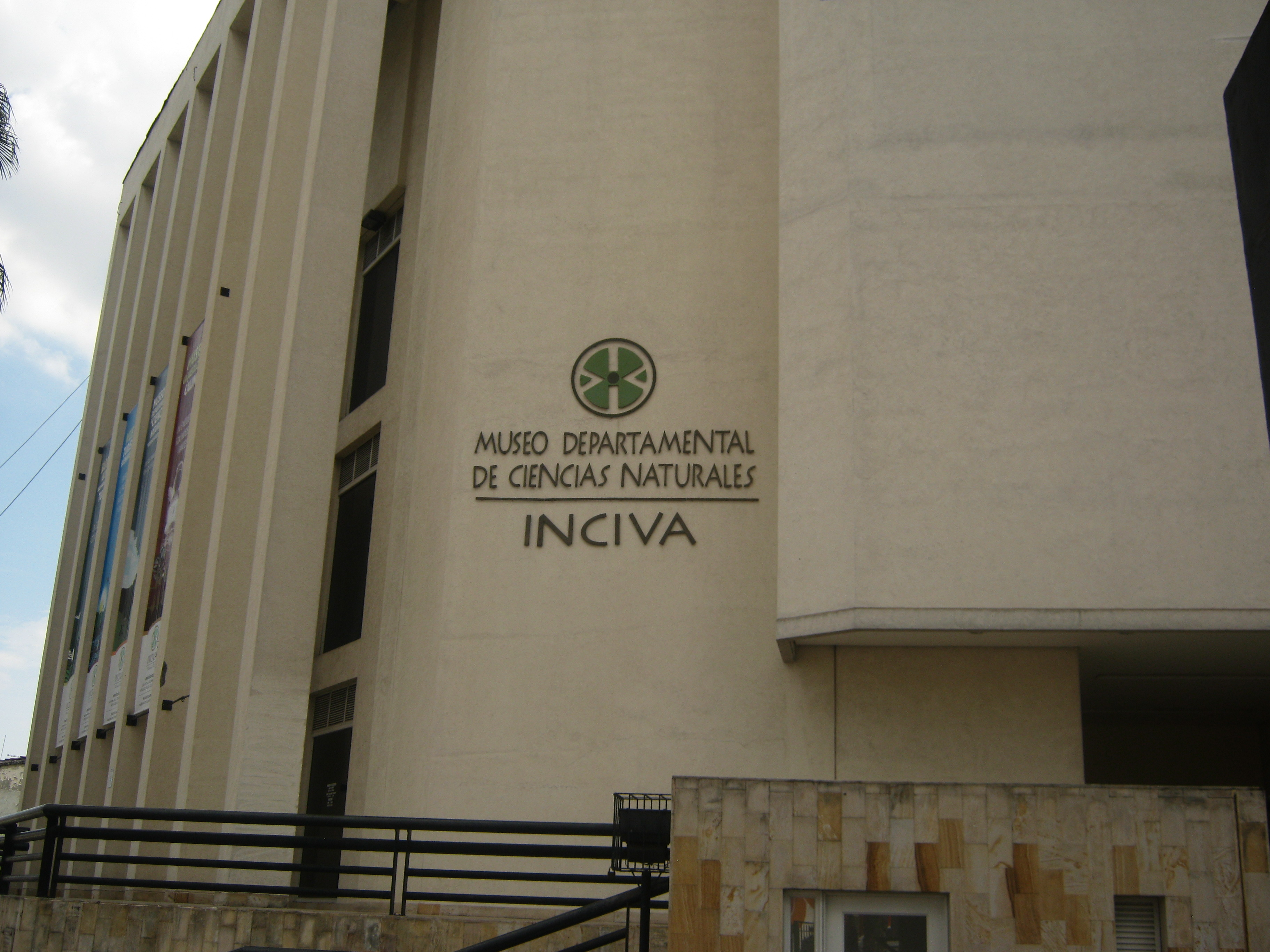 El Museo Departamental de Ciencias Naturales, en la Manzana del Saber